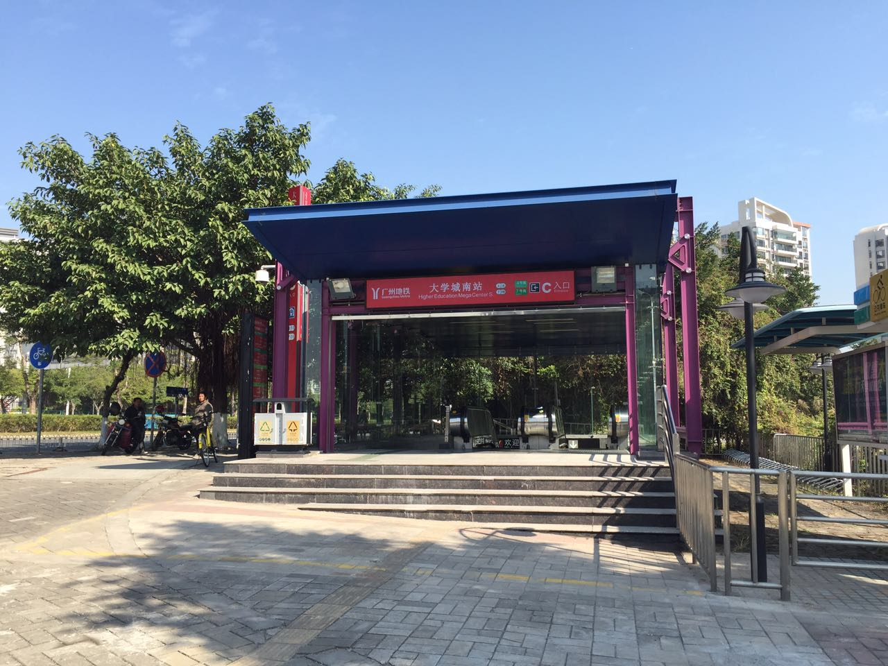 广州地铁大学城南站